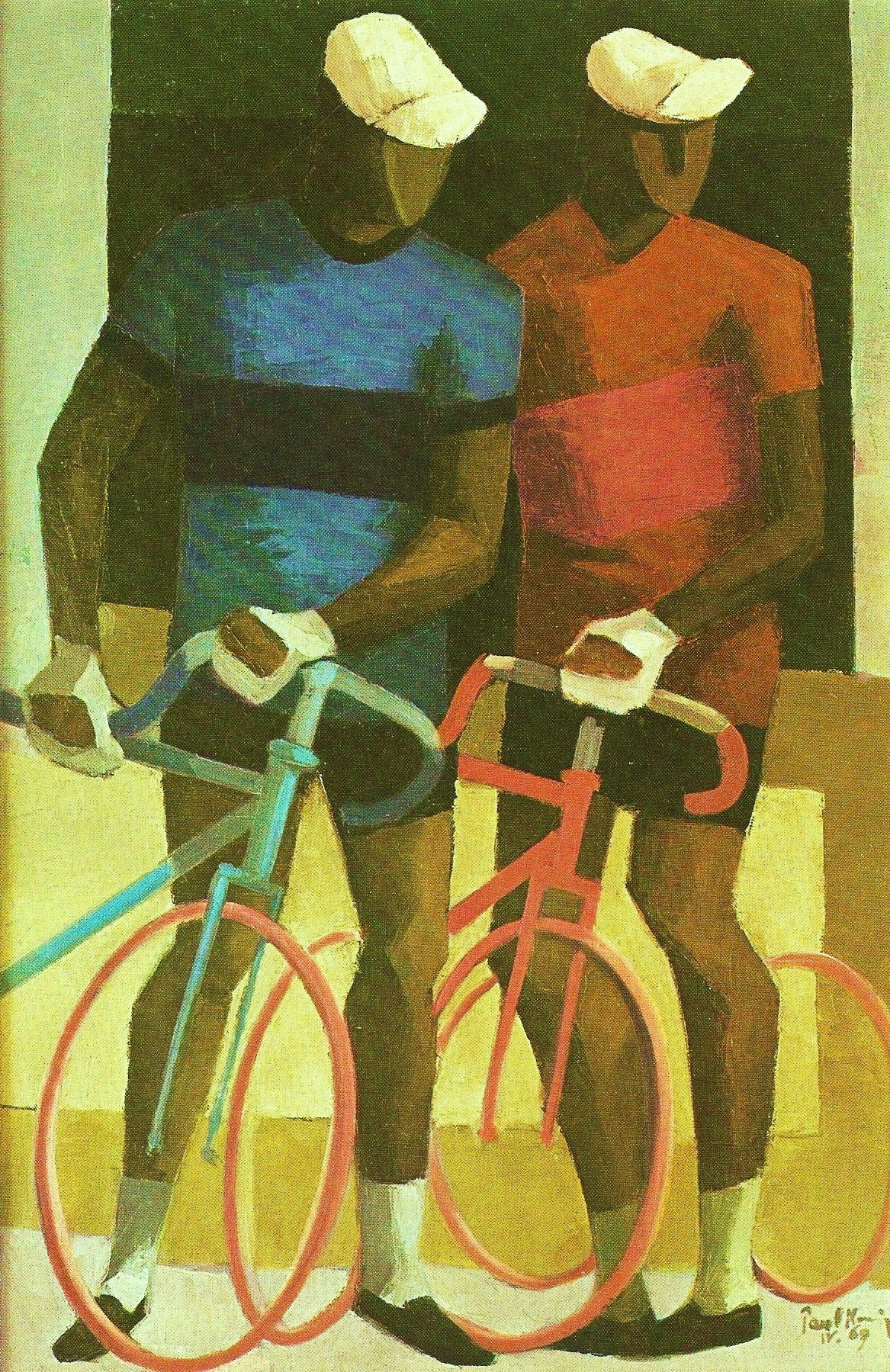 Les deux cyclistes par le peintre suisse Paul Monnier, 92 x 60cm, huile sur toile.